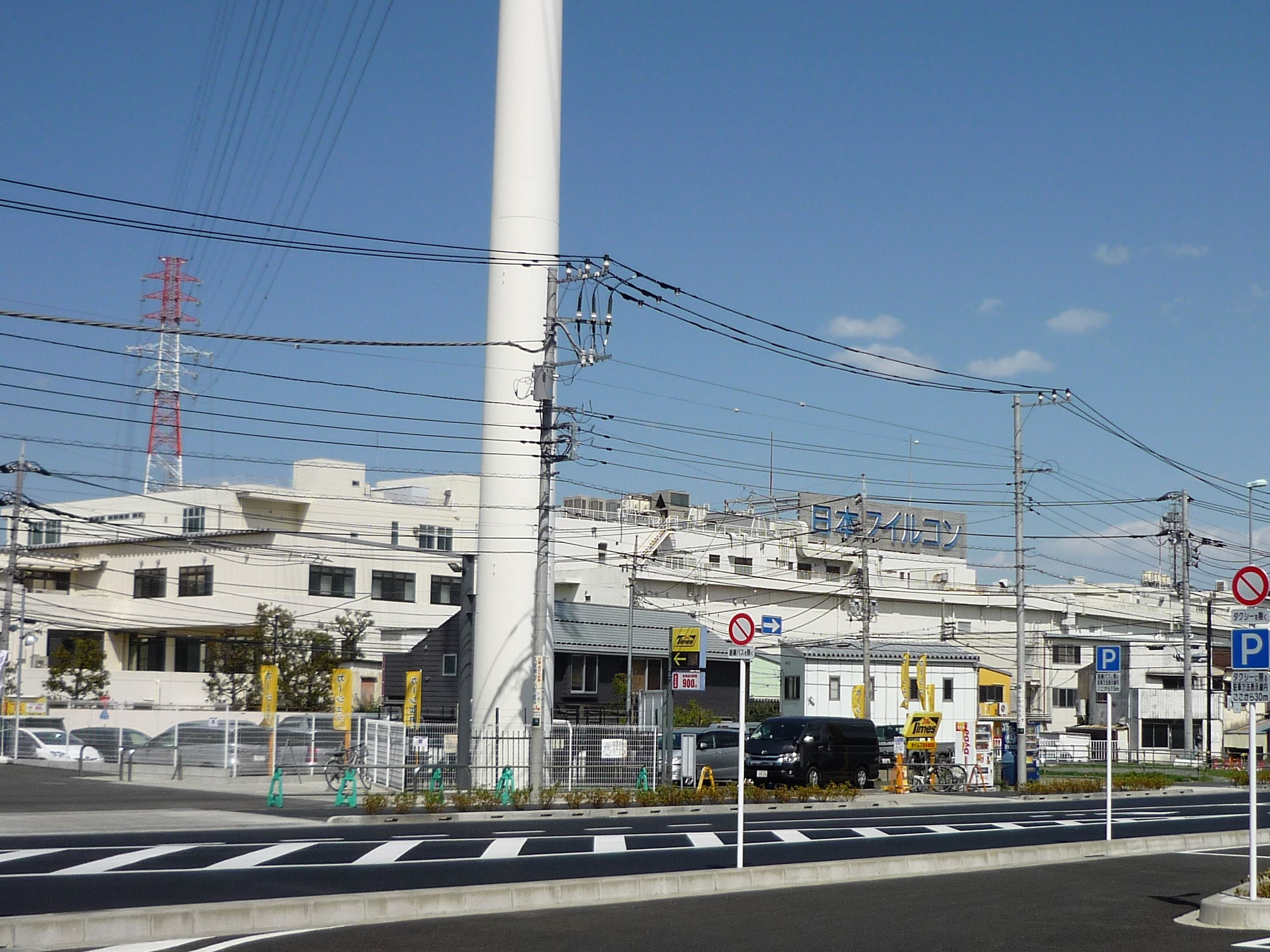 日本フイルコン株式会社 本社・東京事業所（稲城市大丸）